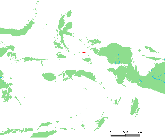 ID Kofiau.PNG